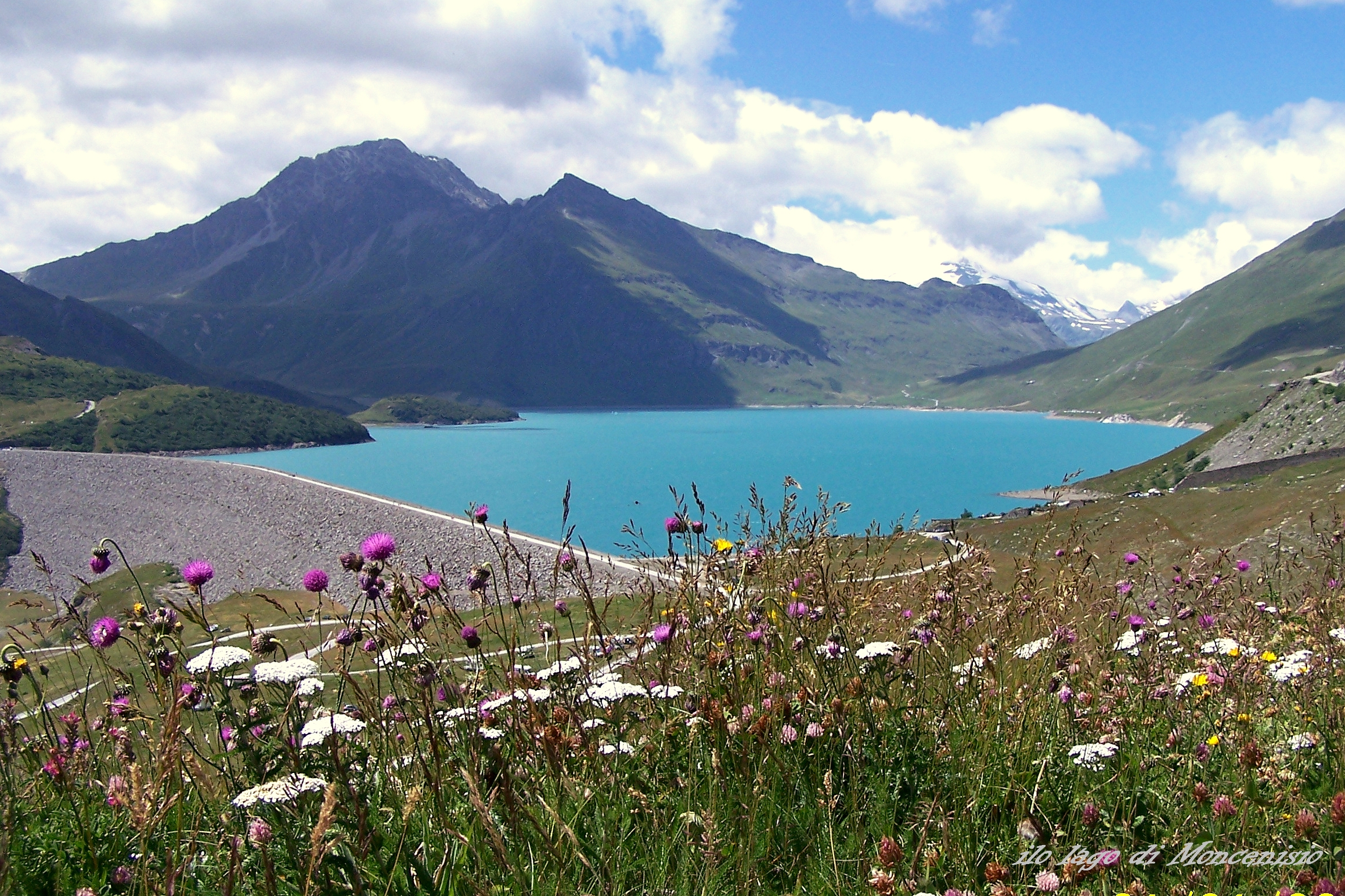 moncenisio